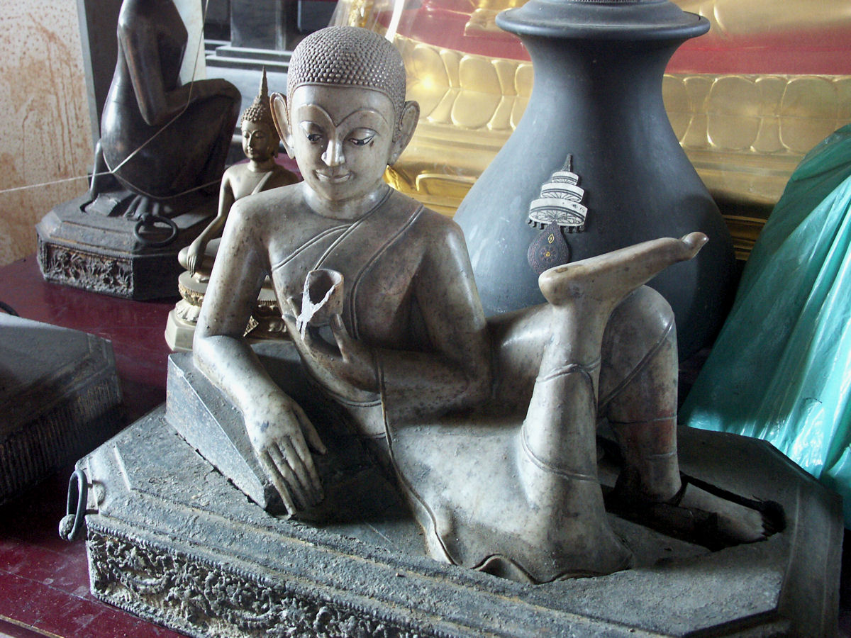 Wat Suthat, Bangkok, Thailand - ดัดตน